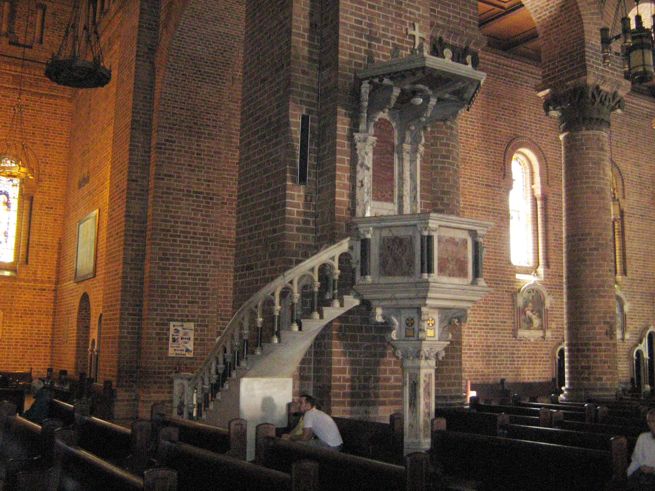 Púlpito de la Catedral Metropolitana de Medellín, Colombia.